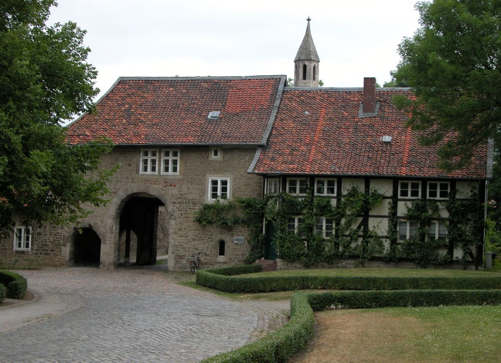 Braunschweig: Kloster Riddagshausen Tor zur Domäne von innen gesehen